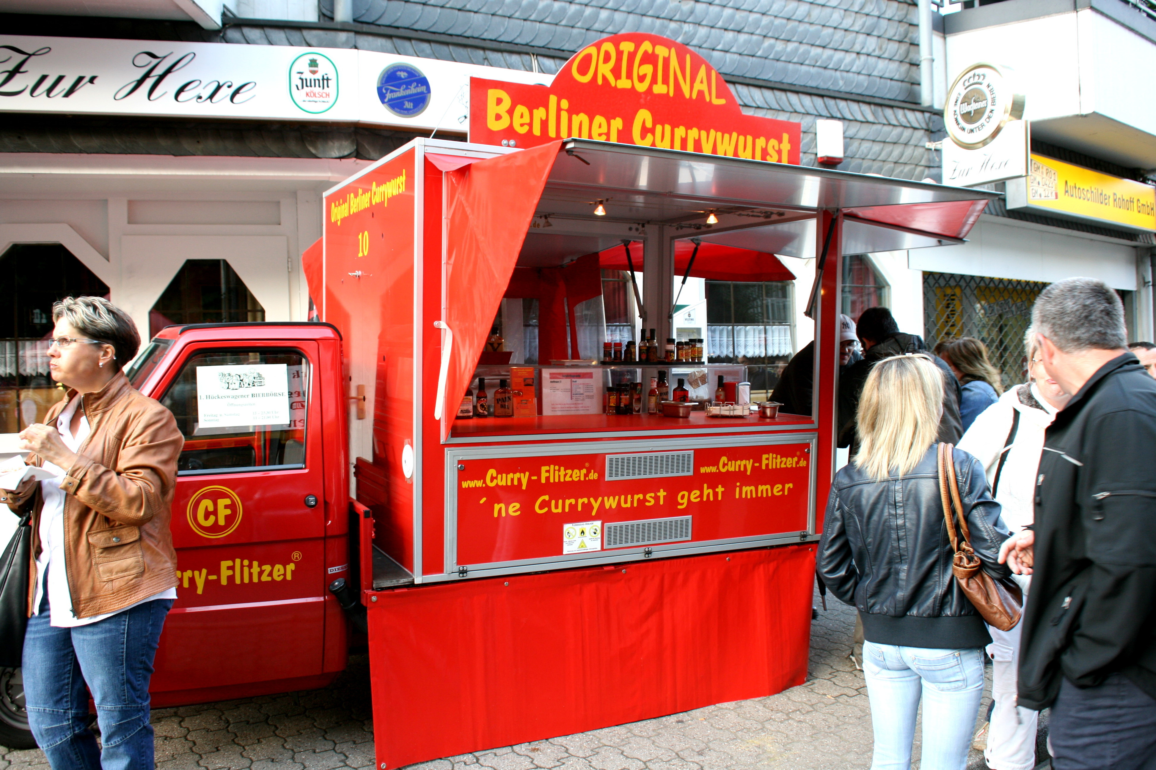 1. Hückeswagener Bierbörse, Bahnhofstraße und Bahnhofplatz in Hückeswagen